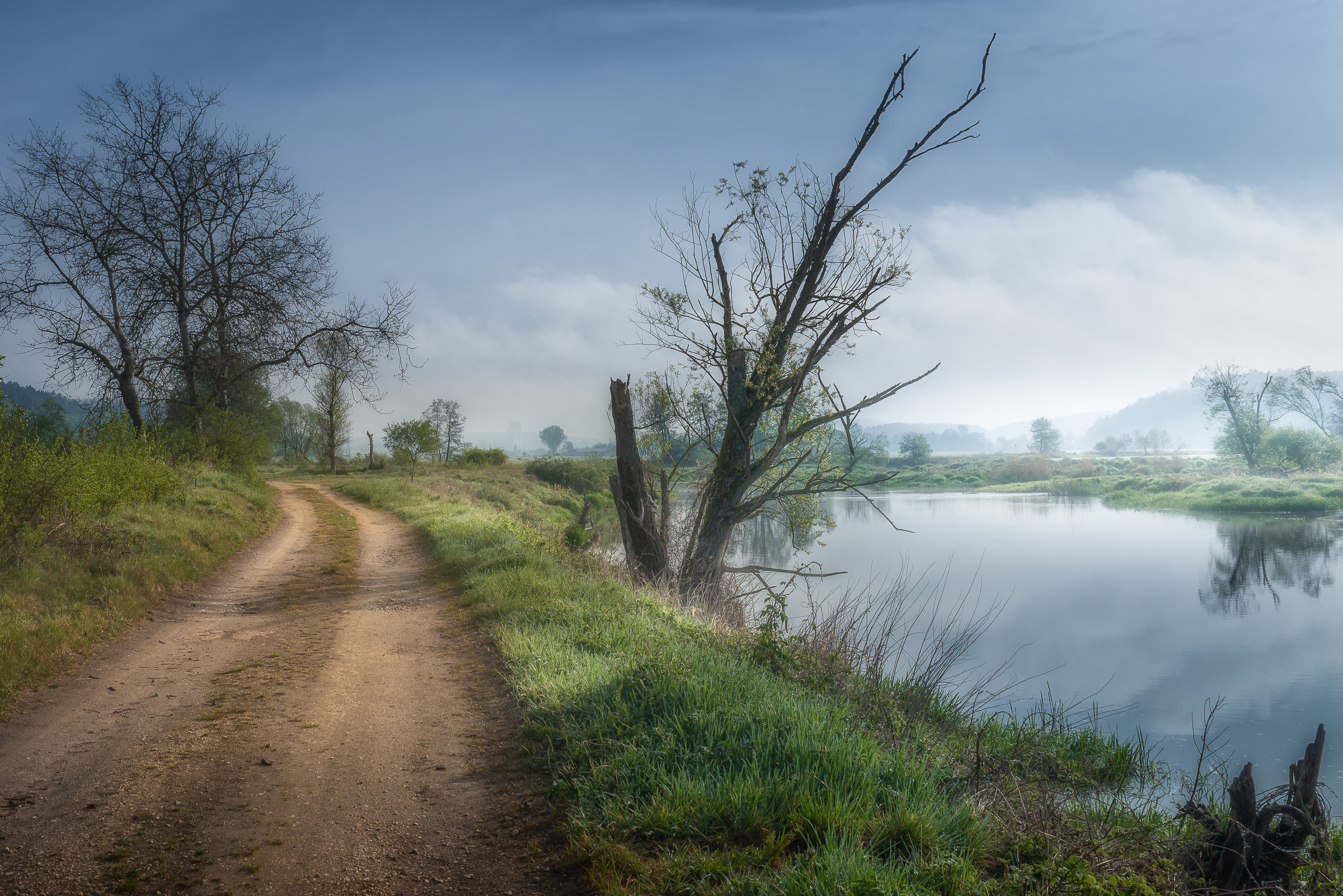 Uferweg nach Mossendorf entlang der Naab. Rechts ist das Naturwehr zu erkennen, welches das Wasser für die Mühle/Turbine in Schirndorf anstaut. Im Dunst verborgen liegt Mossendorf und dahinter Burglengenfeld